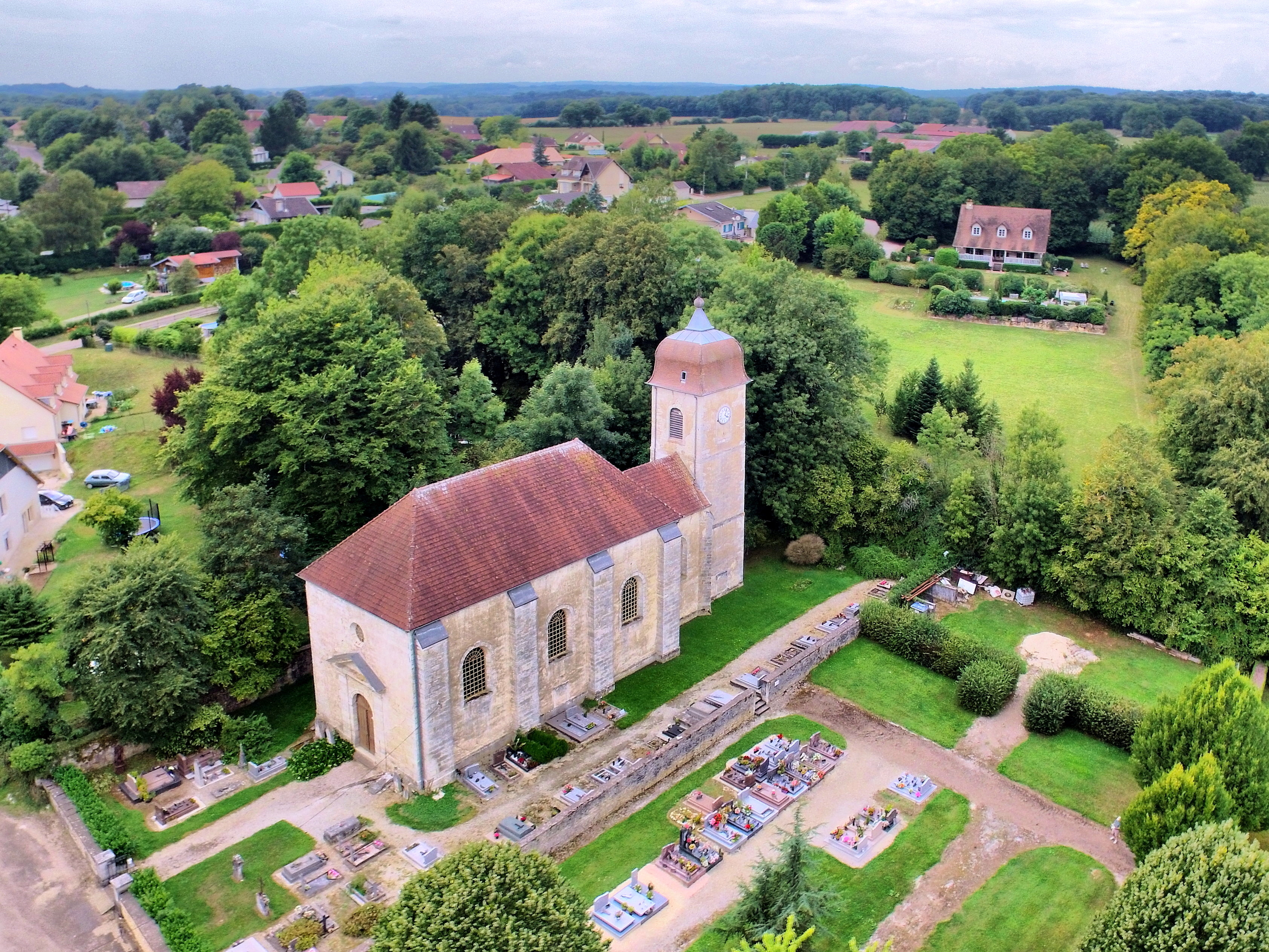 L'église